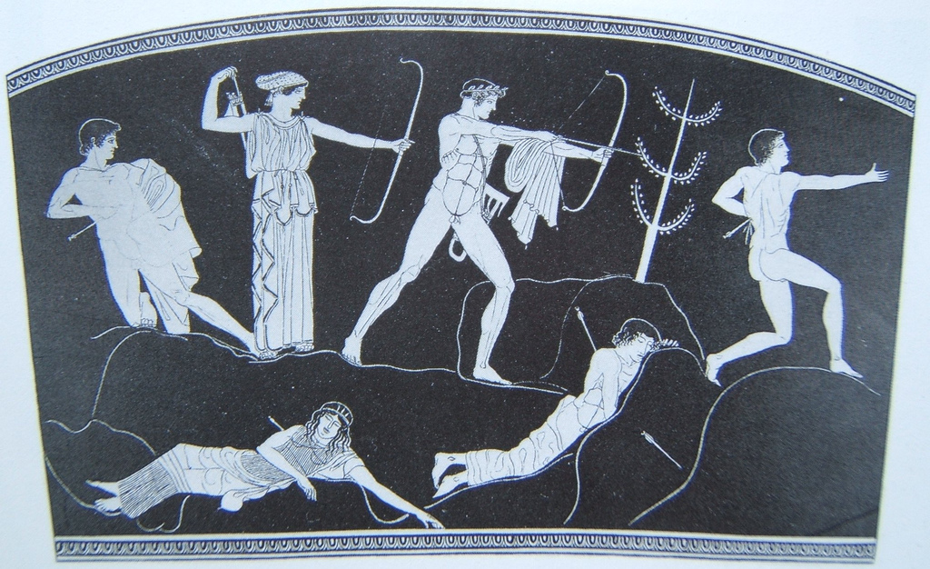 Pintura que representa ós nióbidas